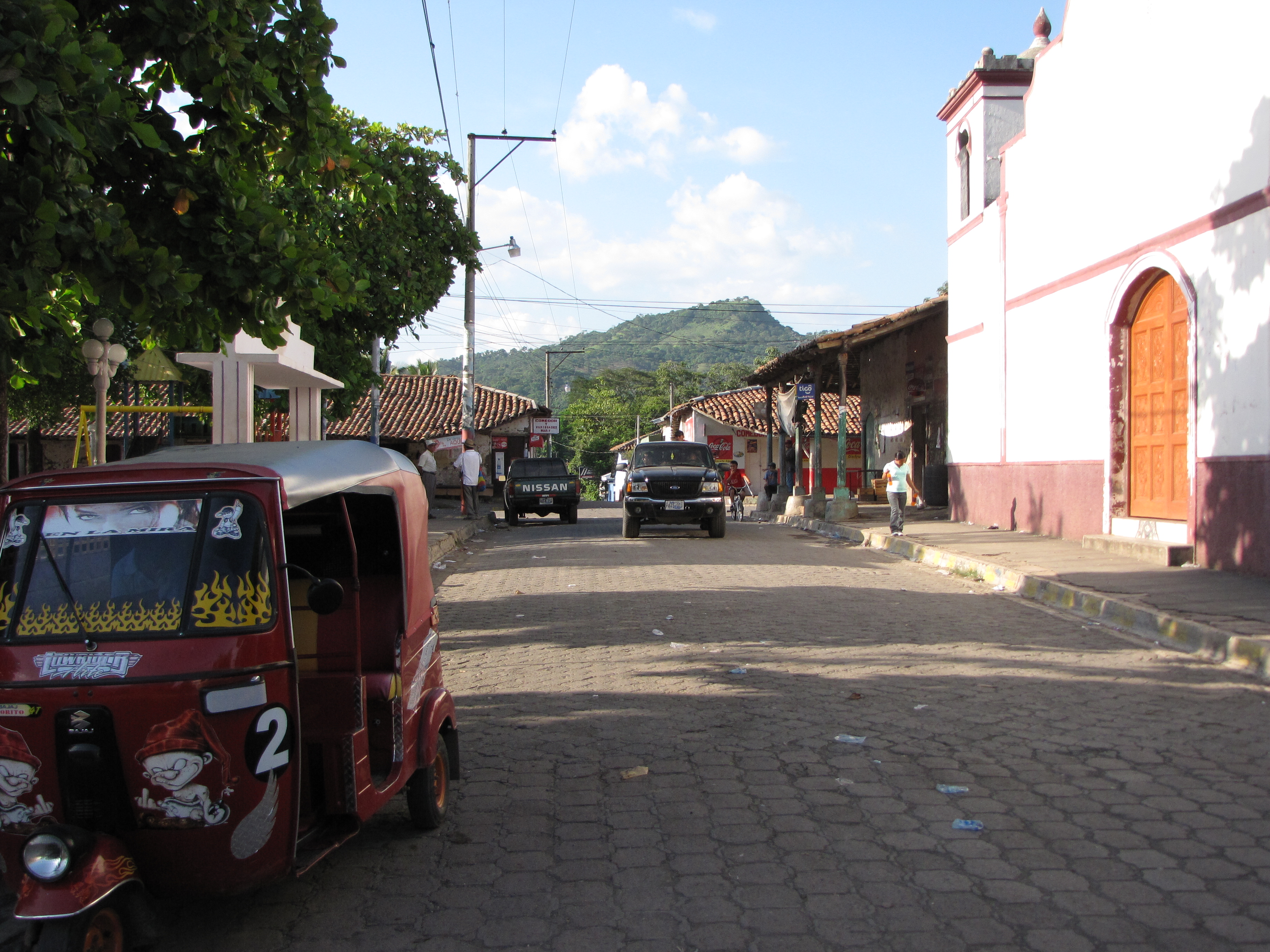 Ciudad de Sesori, El Salvador.